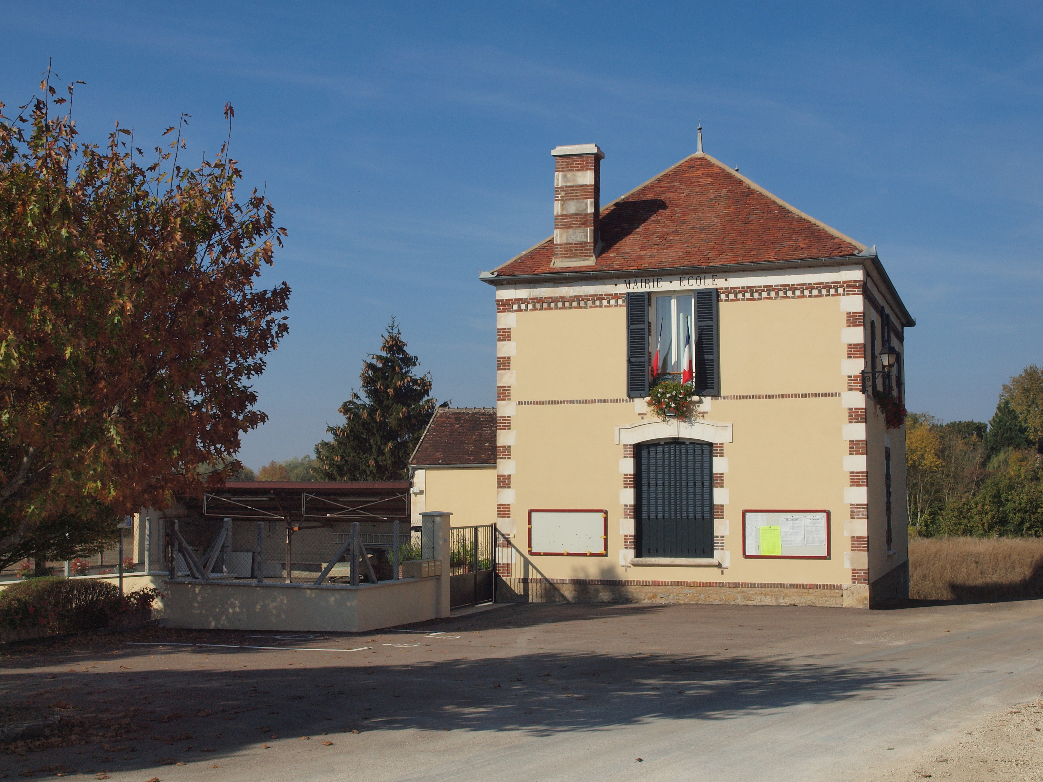 Mairie de Hauterive (Yonne, France)